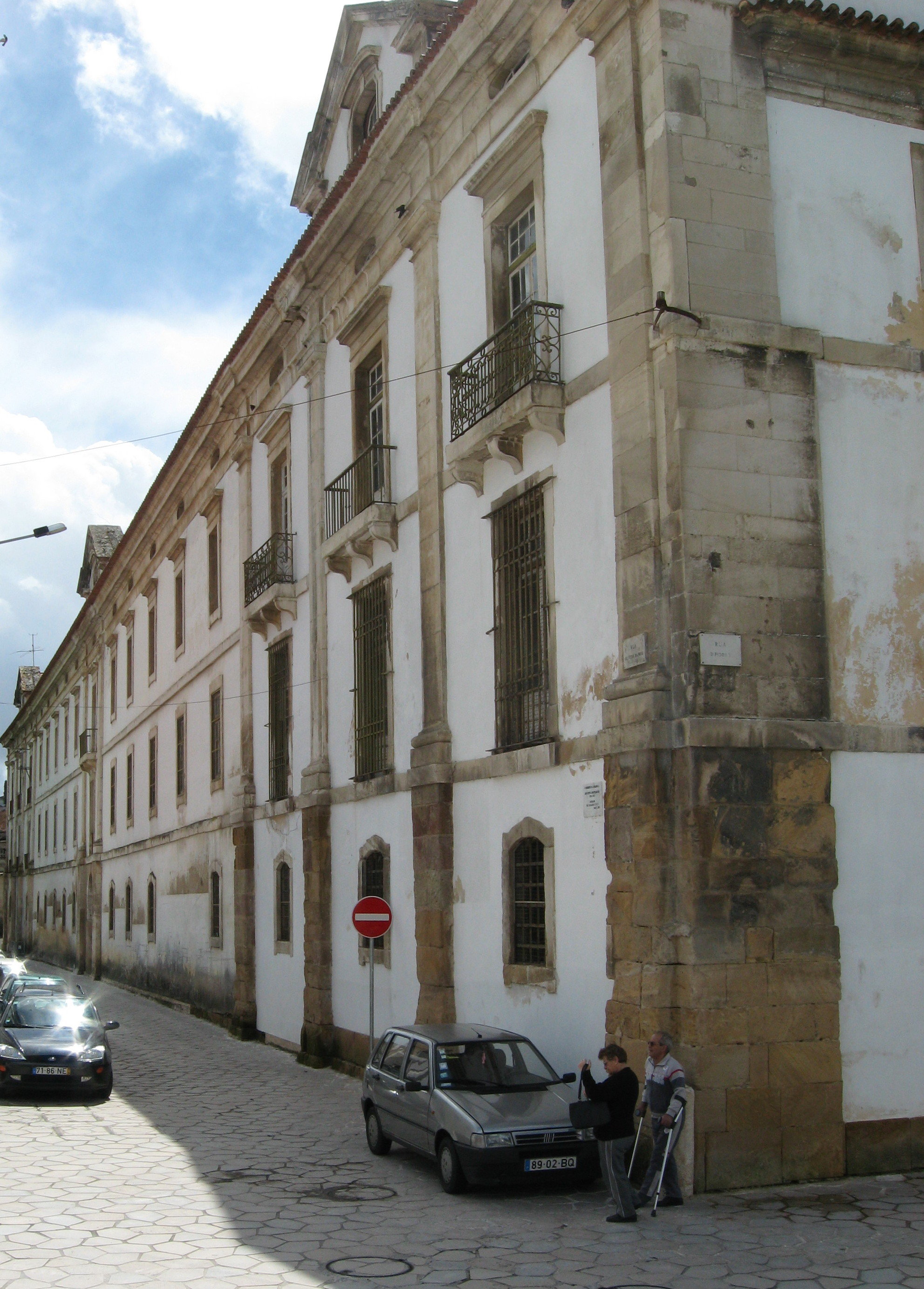 Mosteiro de Alcobaça, Claustro do Rachadoiro, east side